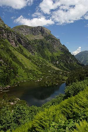 Unter Murgsee